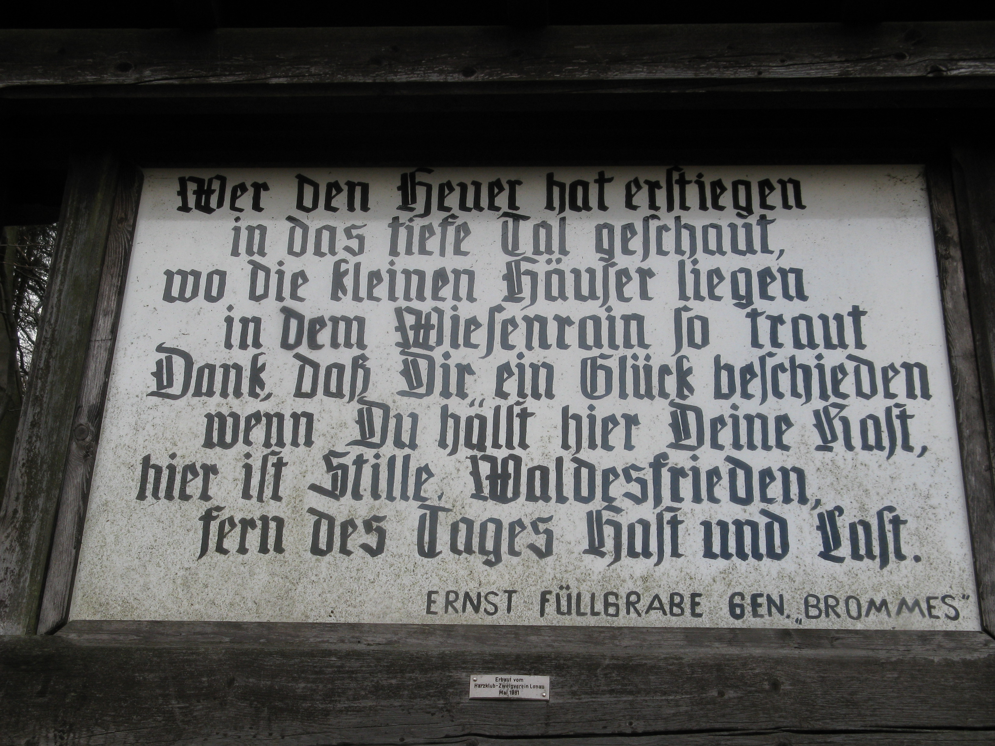 Gedicht von Ernst Füllgrabe am Heuerblick